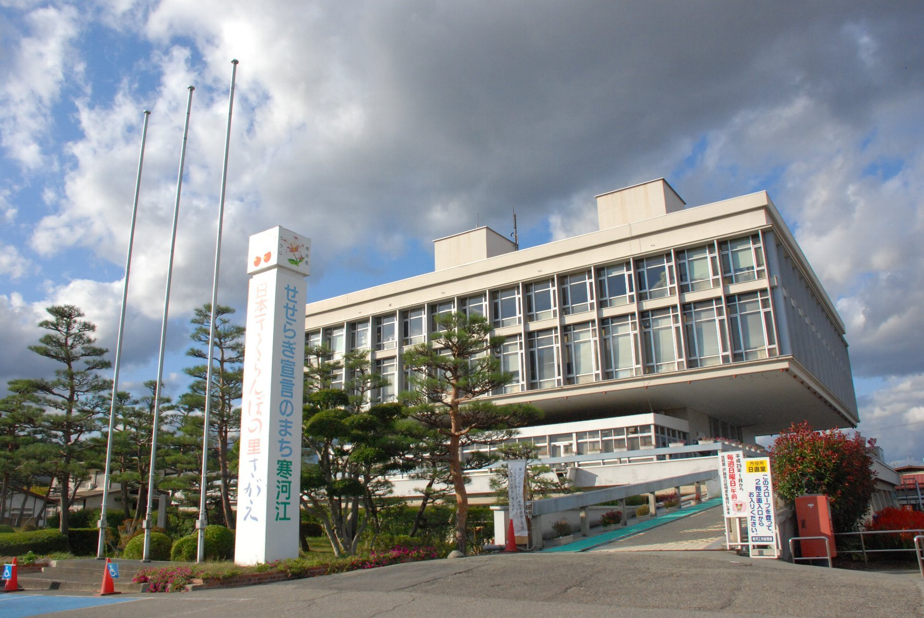 City Hall, Sagae, Yamagata, Japan